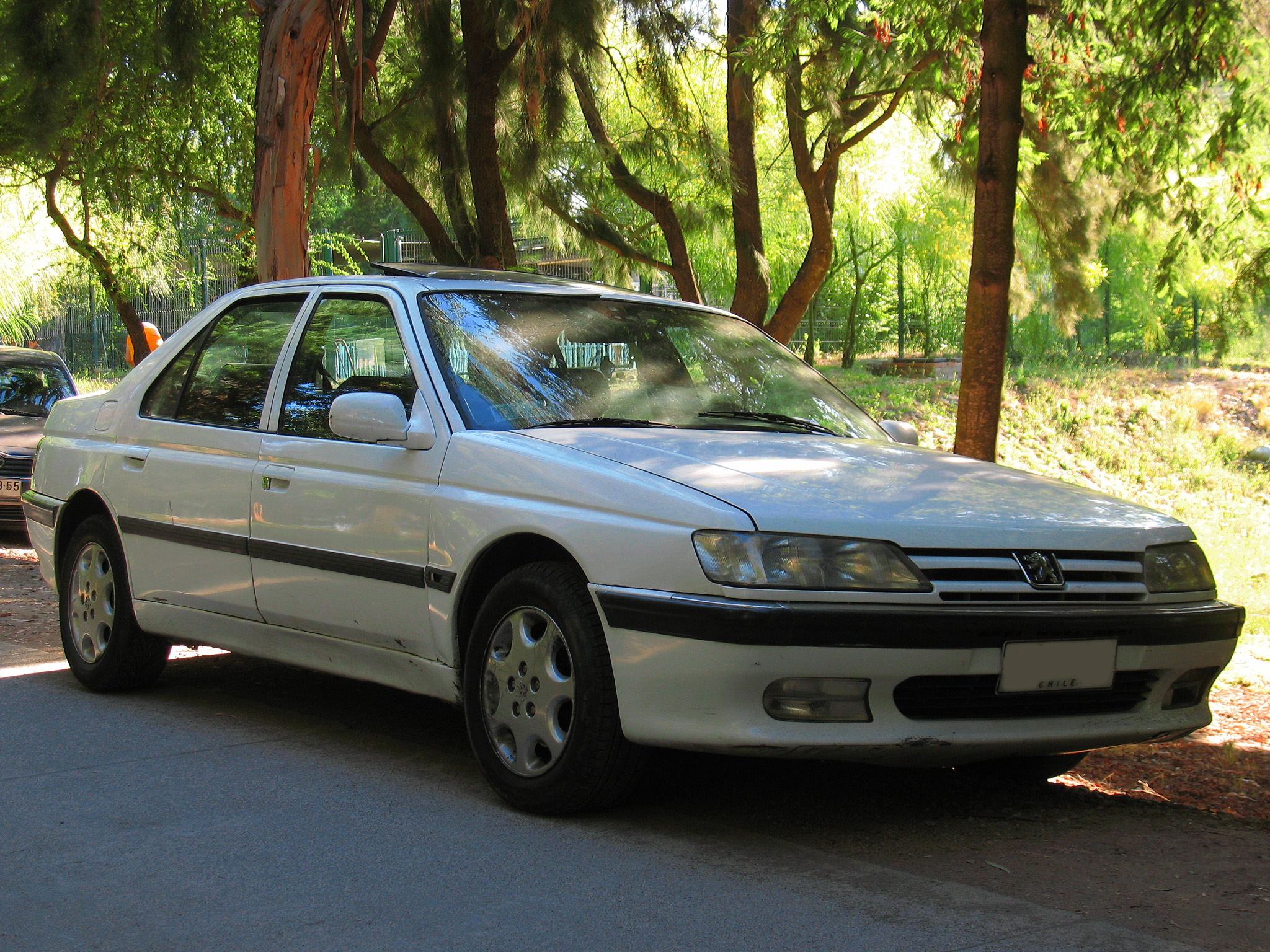 Peugeot 605 2.0 ST 1998